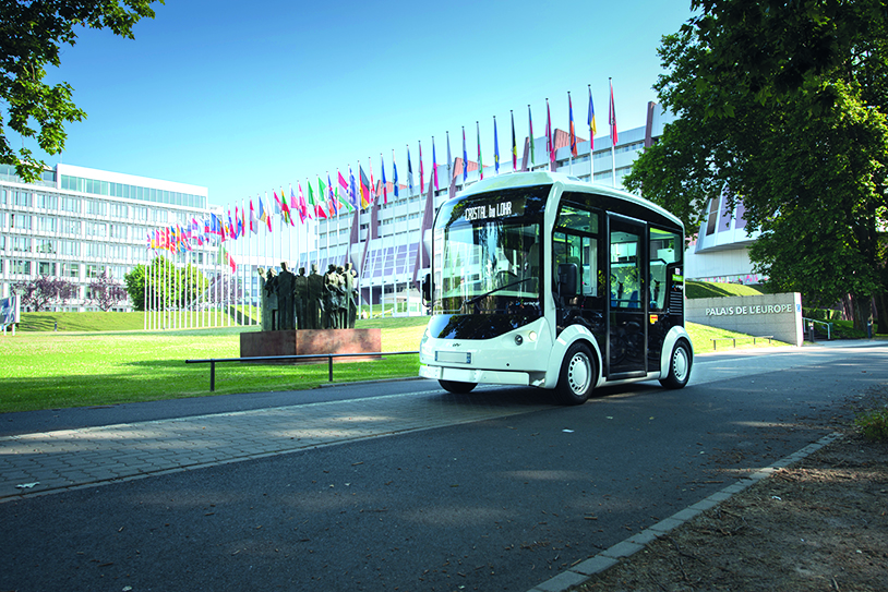 Cristal le véhicule "vert" de LOHR.